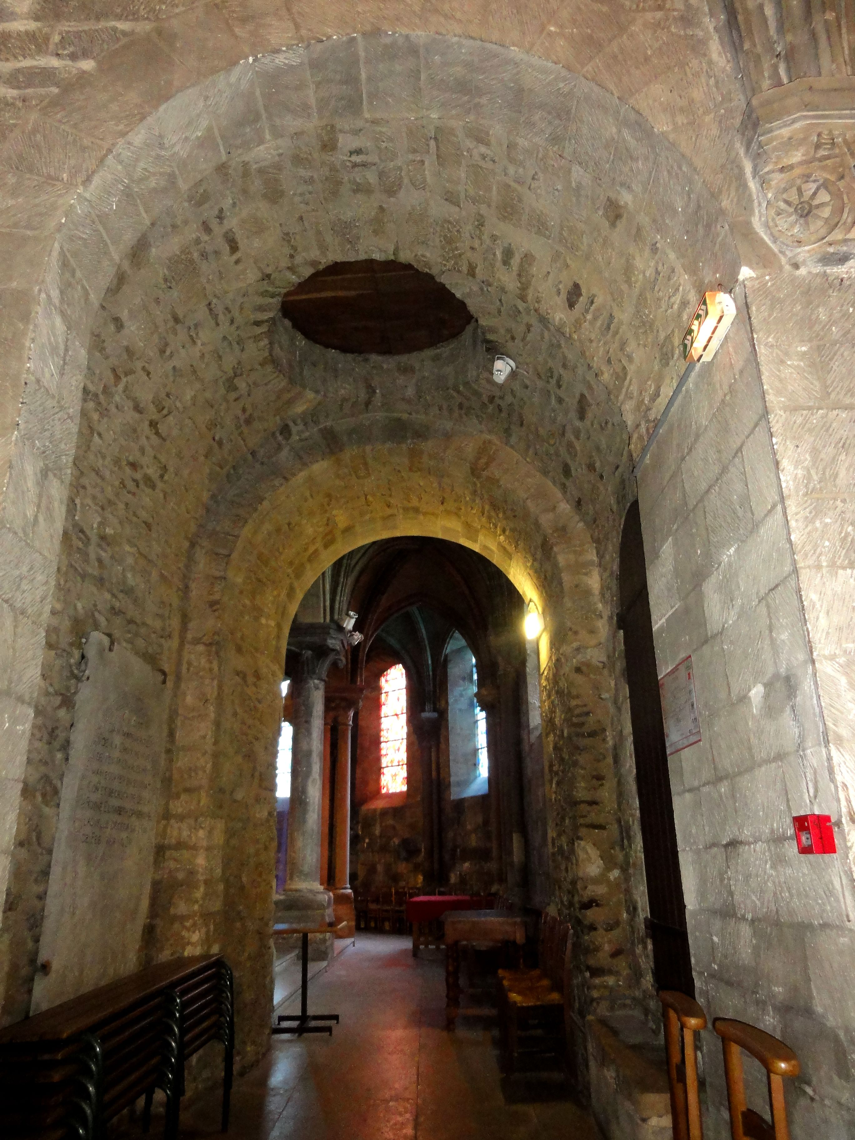 Base du clocher ; vue depuis l'ouest (ancien croisillon sud).